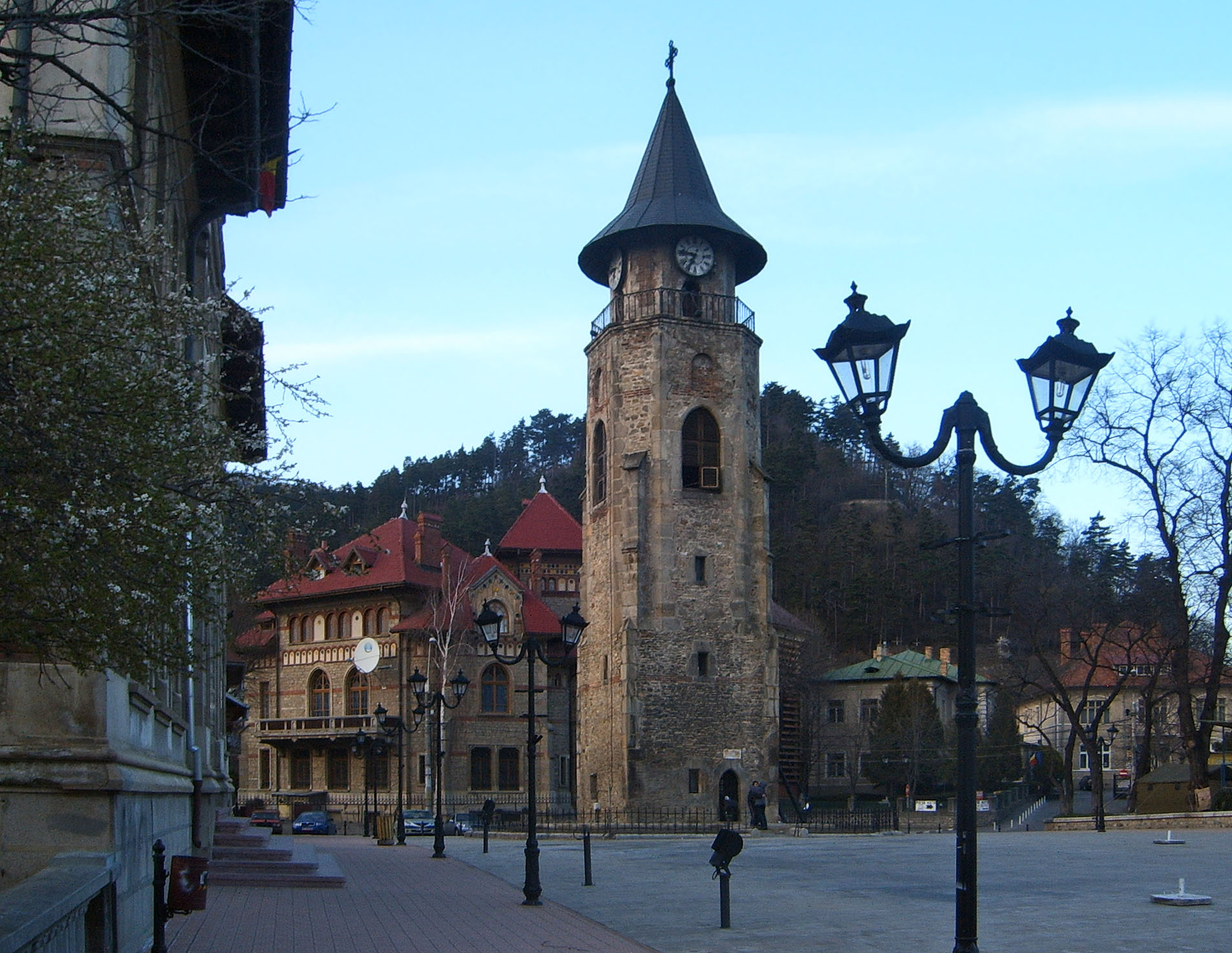 Turnul lui Stefan , Piatra Neamt